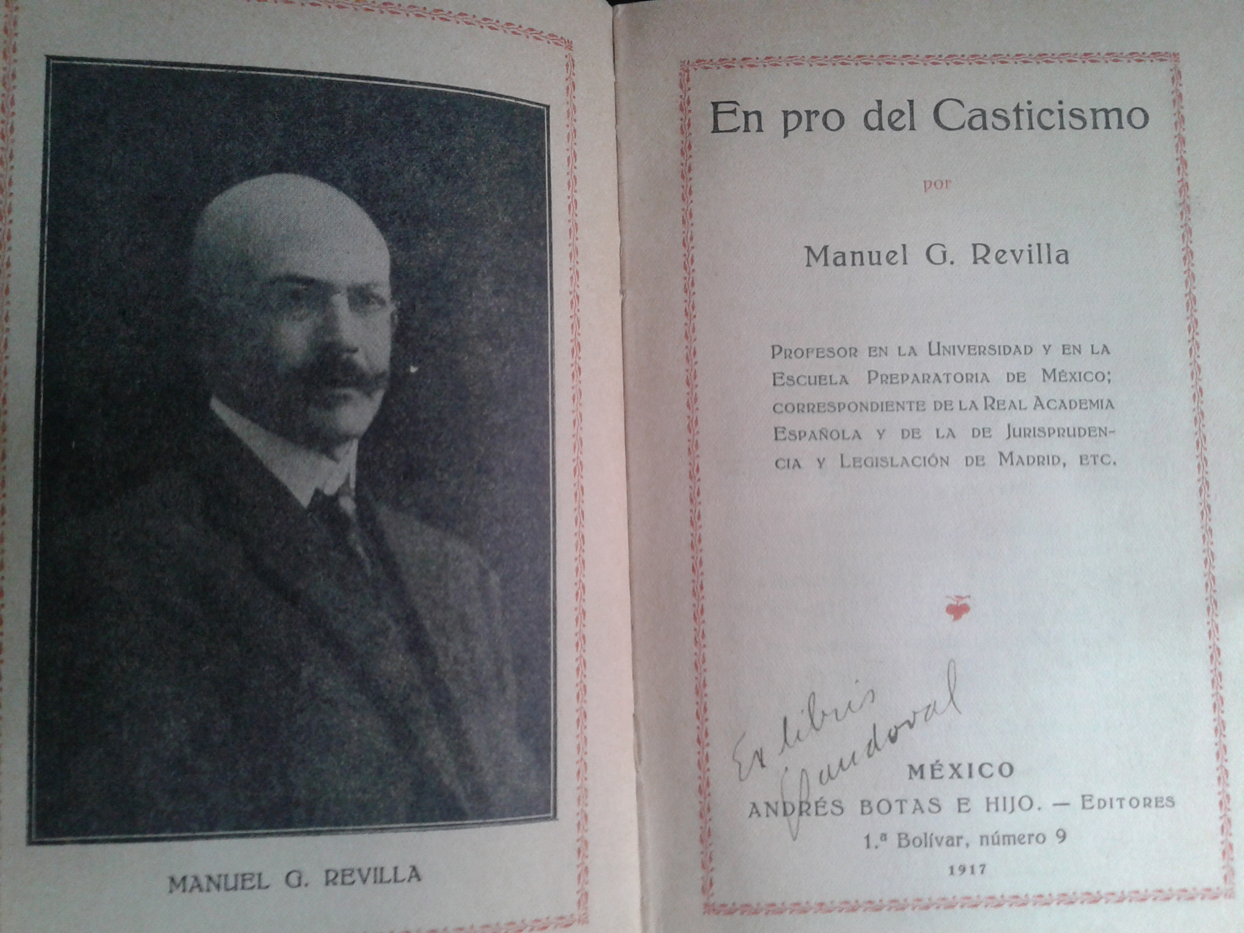 Página inicial de la edición original de "En pro del casticismo", obra de 1917 de Manuel G. Revilla (México: Andrés Botas e Hijo).